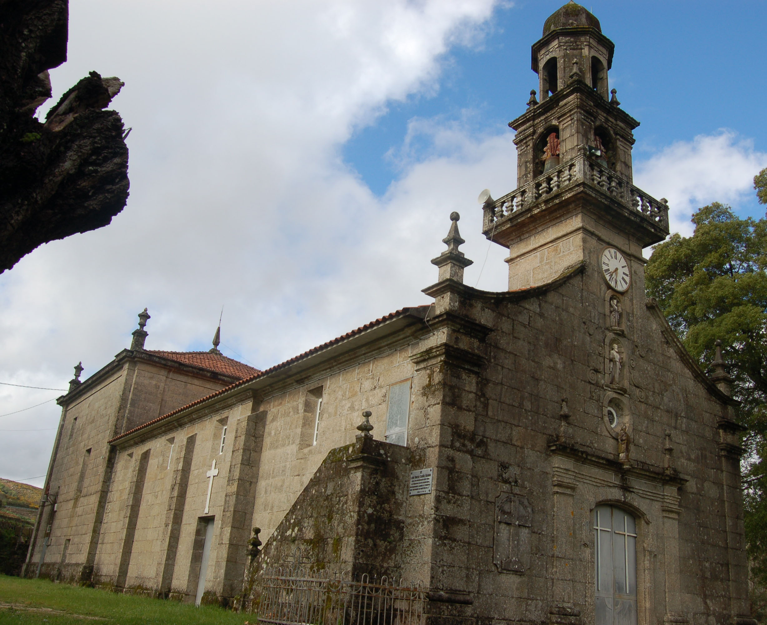 Igrexa parroquial de San Paulo de Xende (A Lama)